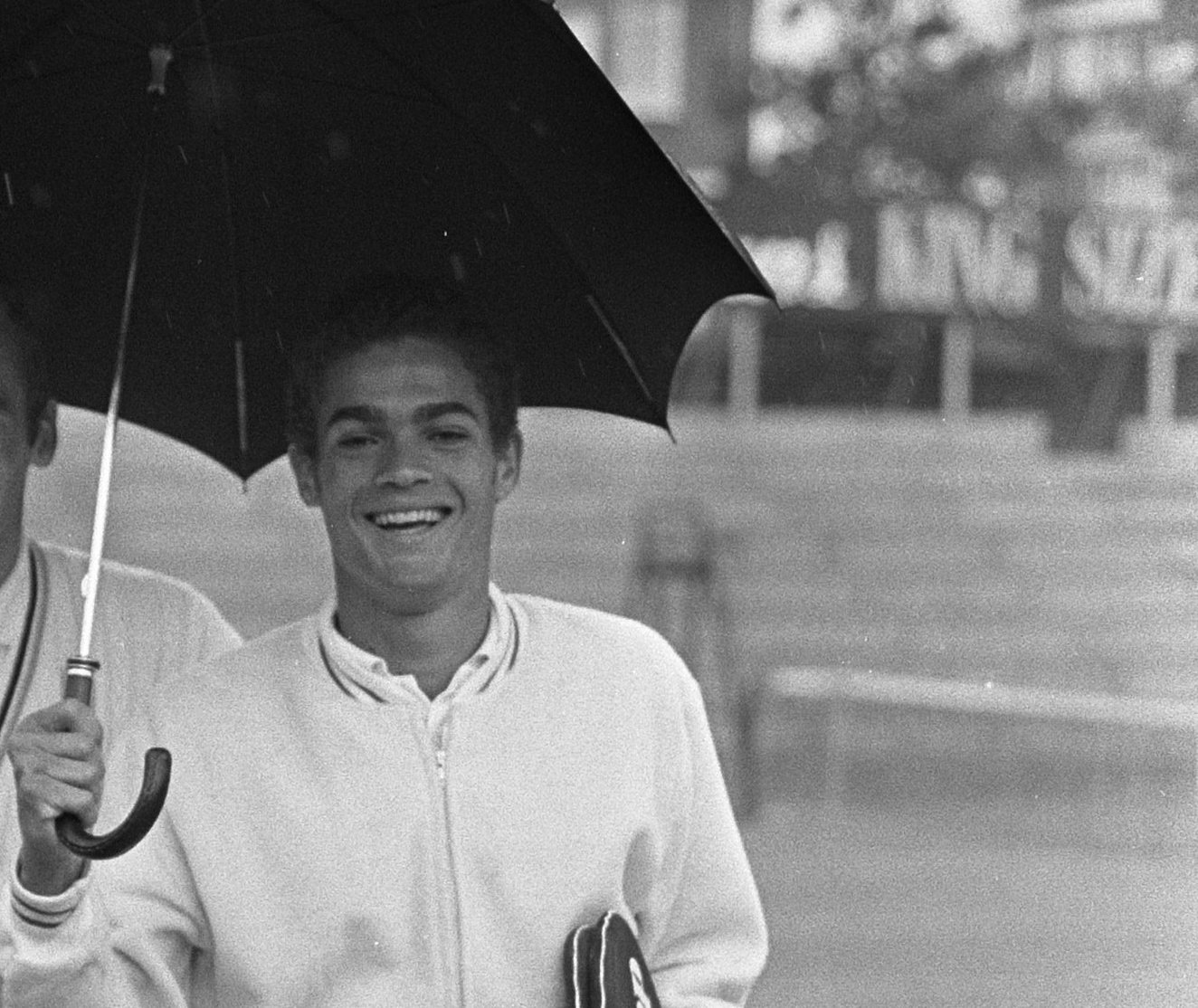 Collectie / Archief : Fotocollectie Anefo Reportage / Serie : Nederlandse Tenniskampioenschappen 1968, Scheveningen Beschrijving : Jan Hajer (links), en Kenneth de Koning, schuilend onder een paraplu Annotatie : Randnummer negatiefstrook 12: Kenneth de Koning (Suriname) Datum : 13 augustus 1968 Locatie : Scheveningen, Zuid-Holland Trefwoorden : groepsportretten, kampioenschappen, tennissers Persoonsnaam : Hajer, Jan, Koning, Kenneth de Fotograaf : Fotograaf Onbekend / Anefo Auteursrechthebbende : Nationaal Archief Materiaalsoort : Negatief (zwart/wit) Nummer archiefinventaris : bekijk toegang 2.24.01.05 Bestanddeelnummer : 921-5925